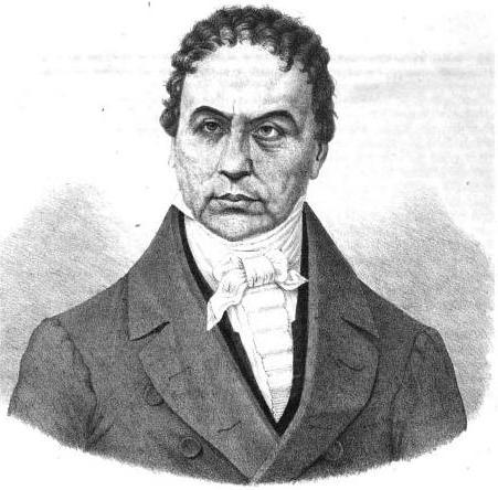 D. Carl Kirchner (1788-1855), Director des Stralsunder Gymnasiums von 1821 bis 1832, anschließend Rektor der Landesschule Pforta